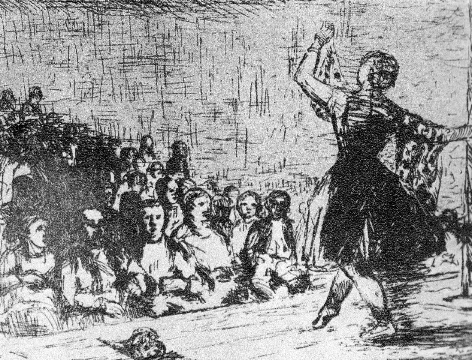 Halina Chrostowska, W świetlicy (Cykl: P.G.R.), 1954r.